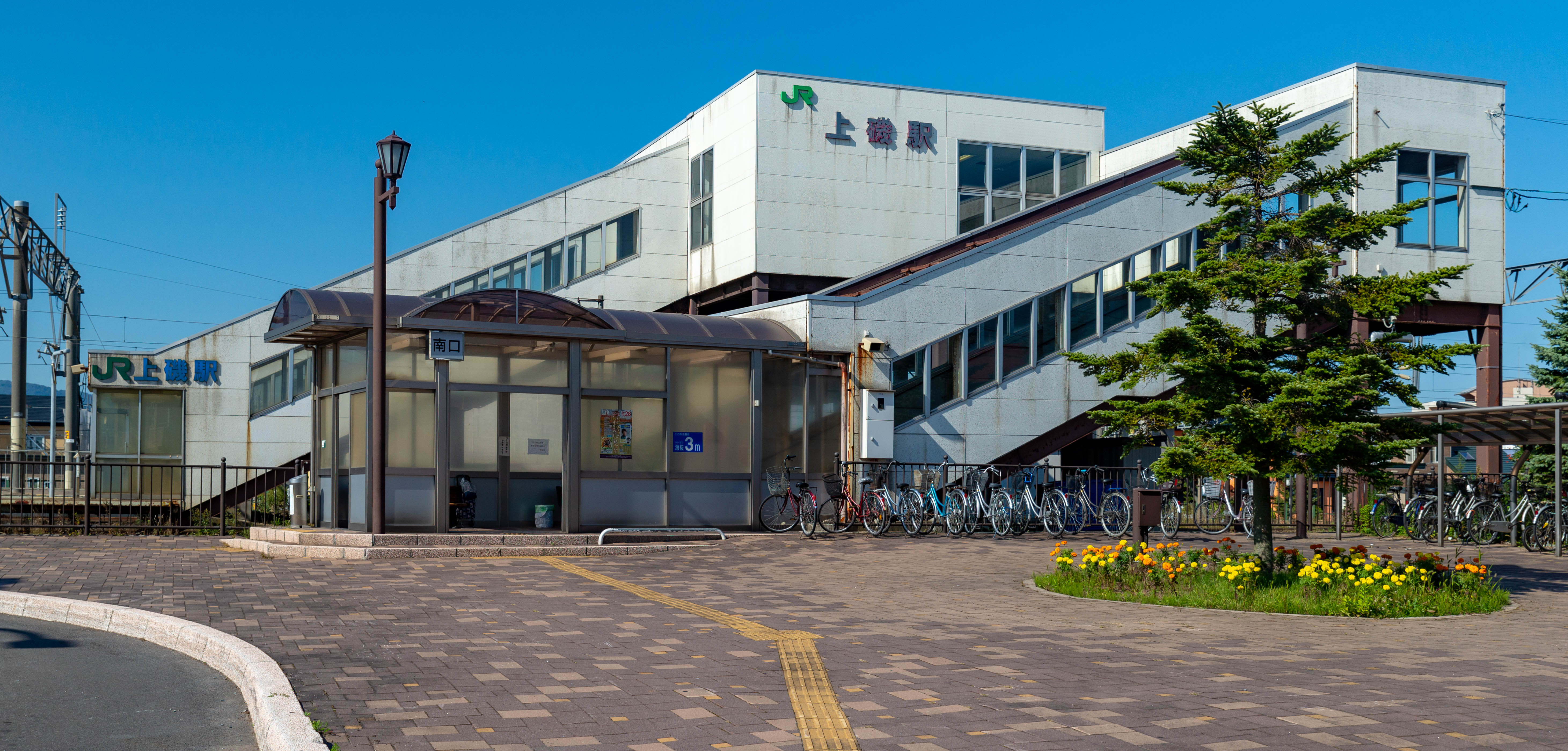 道南いさりび鉄道株式会社上磯駅駅舎 （北海道旅客鉄道株式会社江差線上磯駅駅舎）